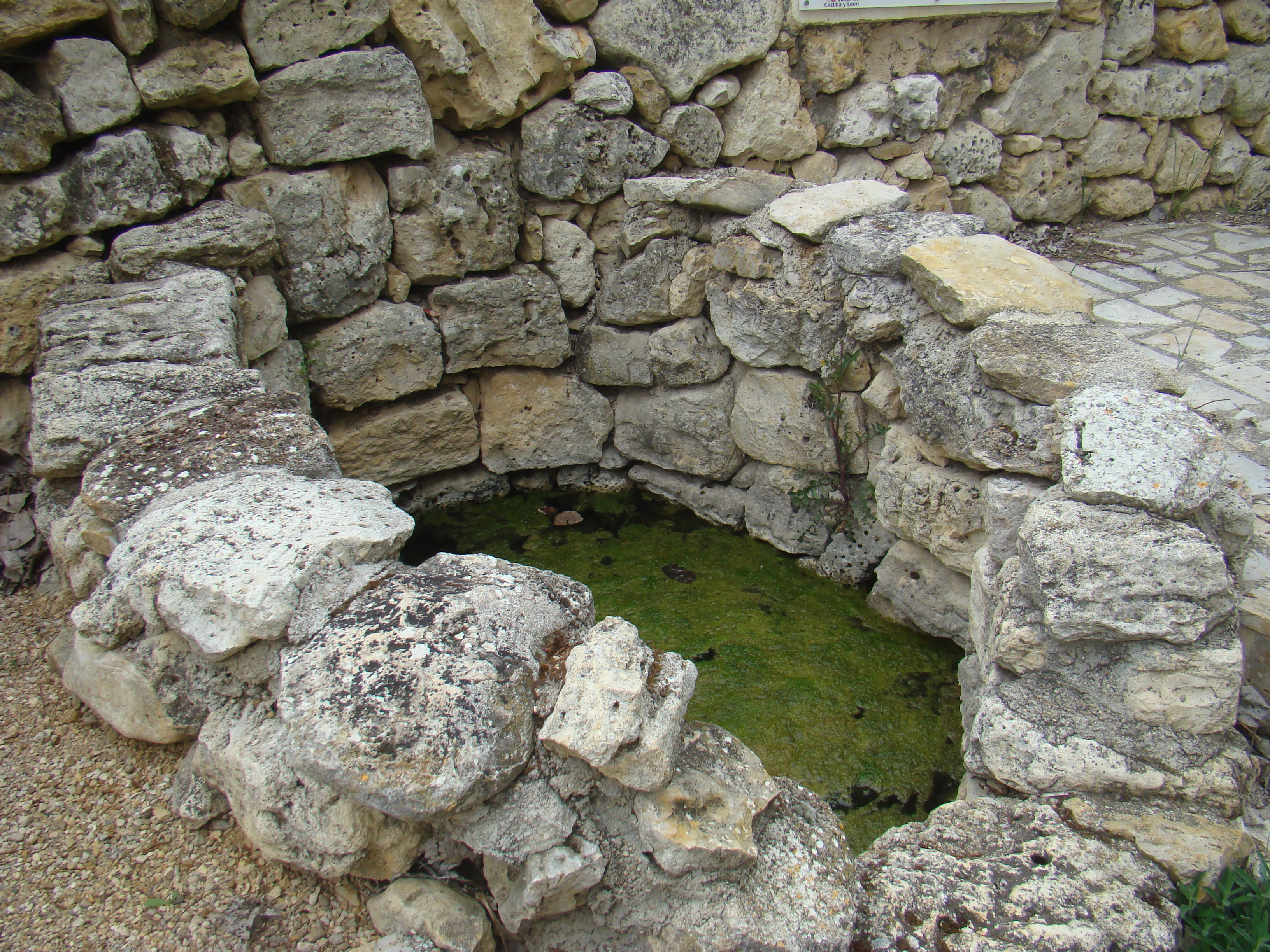 La Mudarra (Valladolid, España). Fuente de Porras, manantial donde nace el río Hornija, a pocos metros de la localidad de La Mudarra.